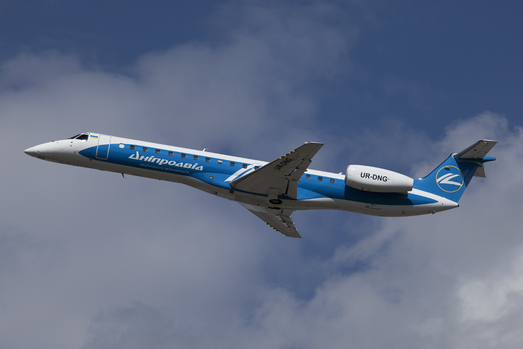 UR-DNG Erj145 Dnepravia